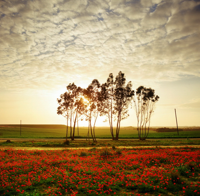 סיבוב סעד